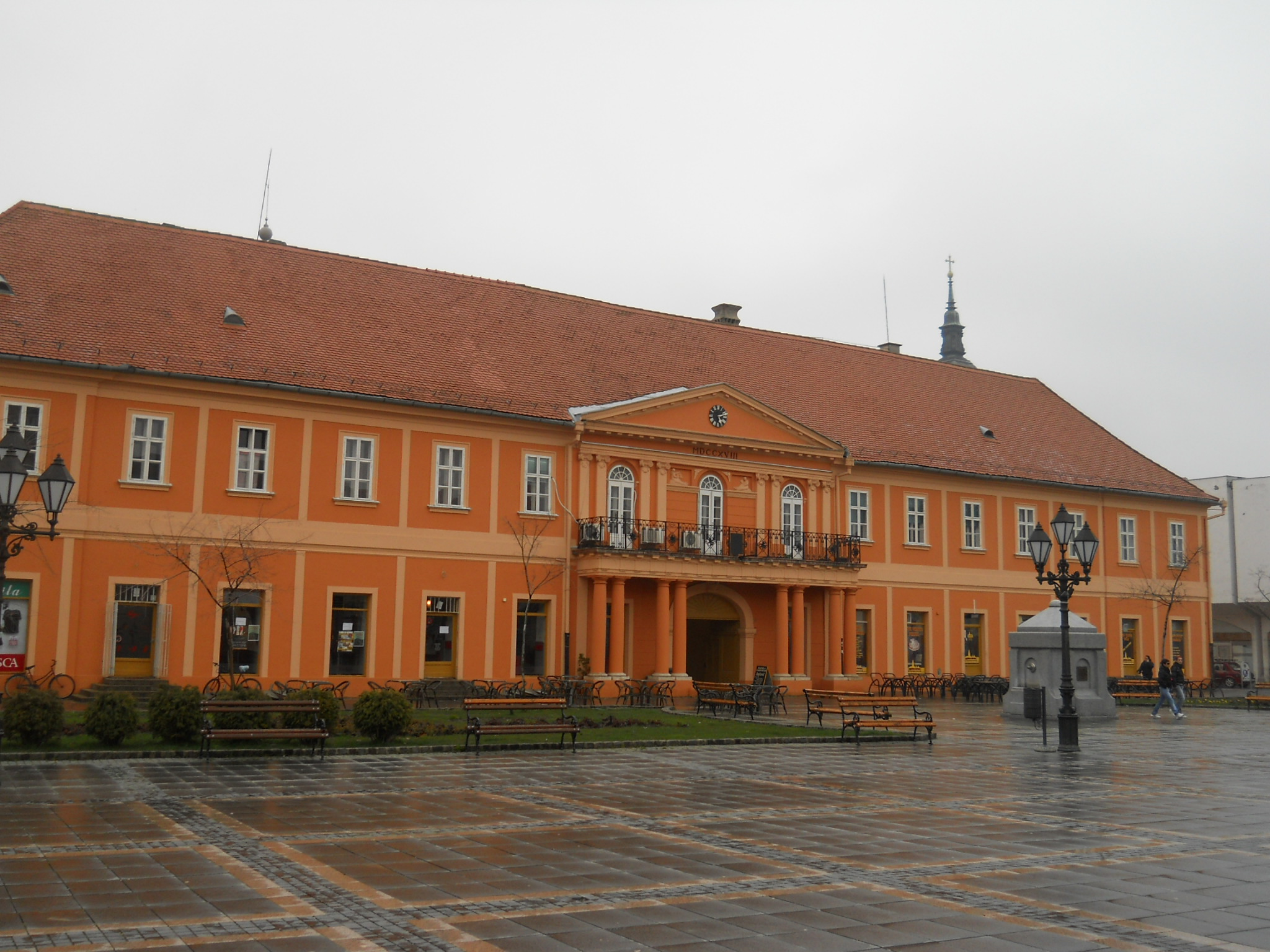 Zombor - régi városháza (keleti oldal, Kralja Petra I felől)